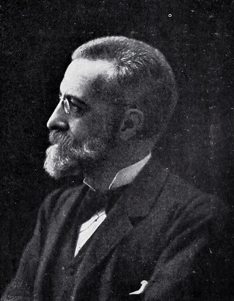 Retrato de Francisco Javier de Burgos y Sarragoiti, fotografía de Manuel Compañy.